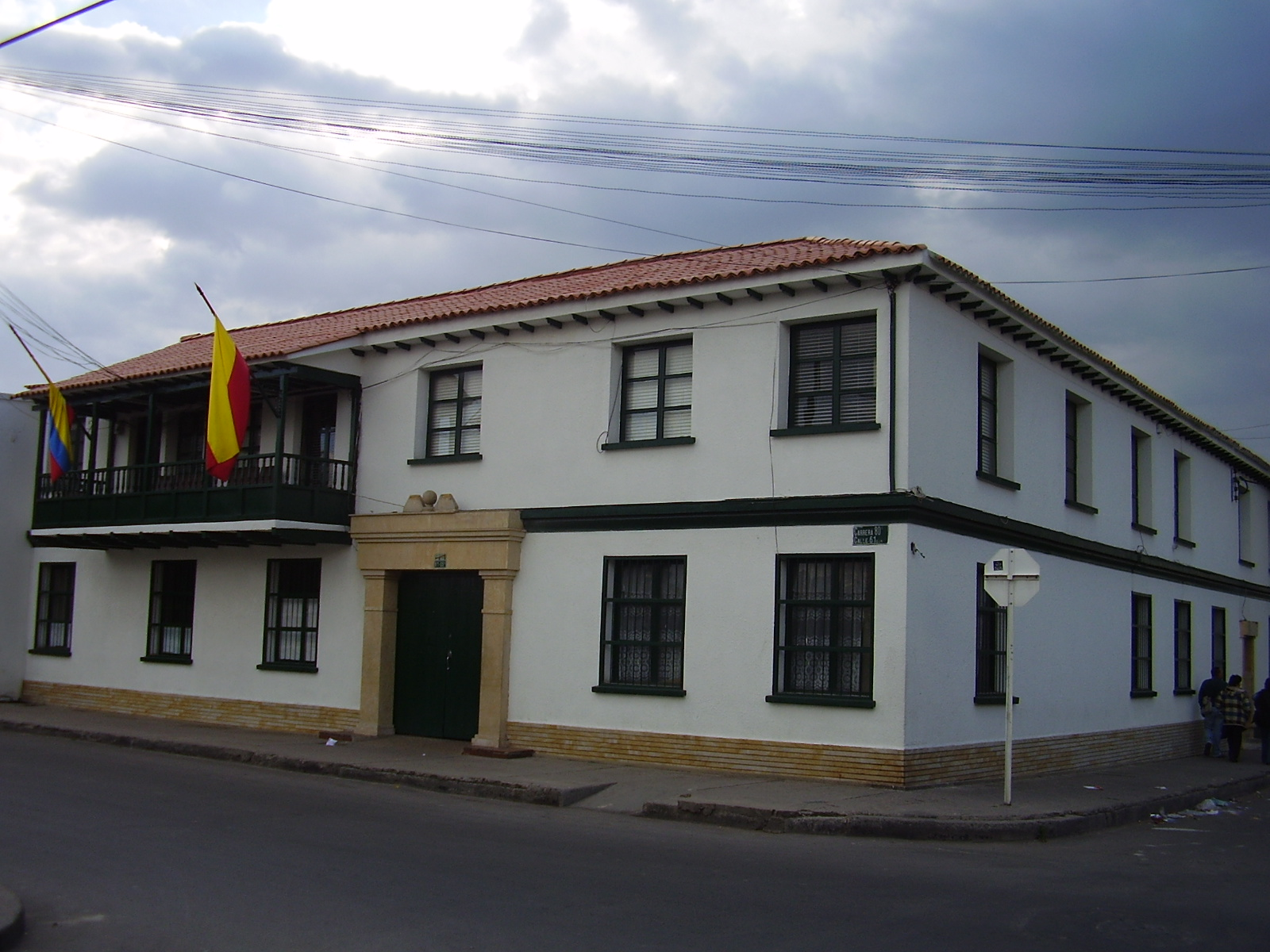 Foto de la alcaldia menor de Bosa (Bogotá)